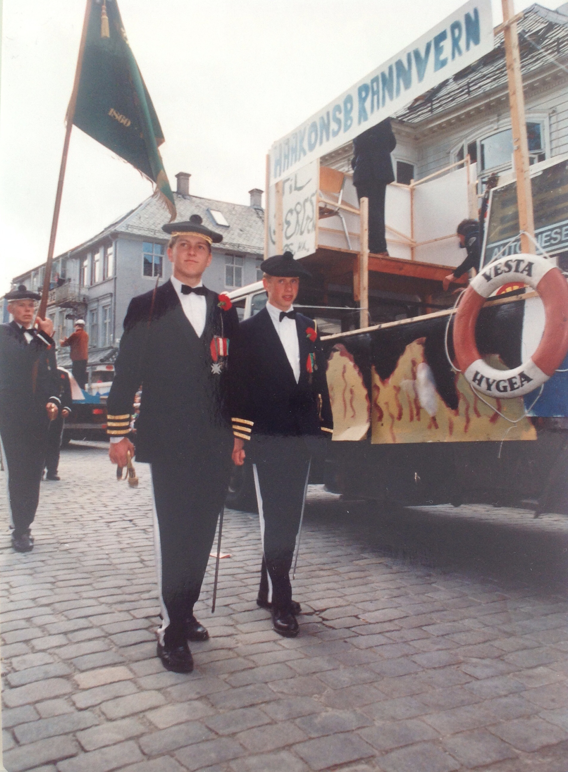 Bilde tatt 17.mai 1994.